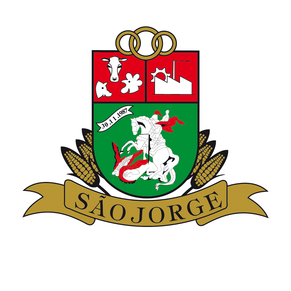 Brasão São Jorge (Rio Grande do Sul)